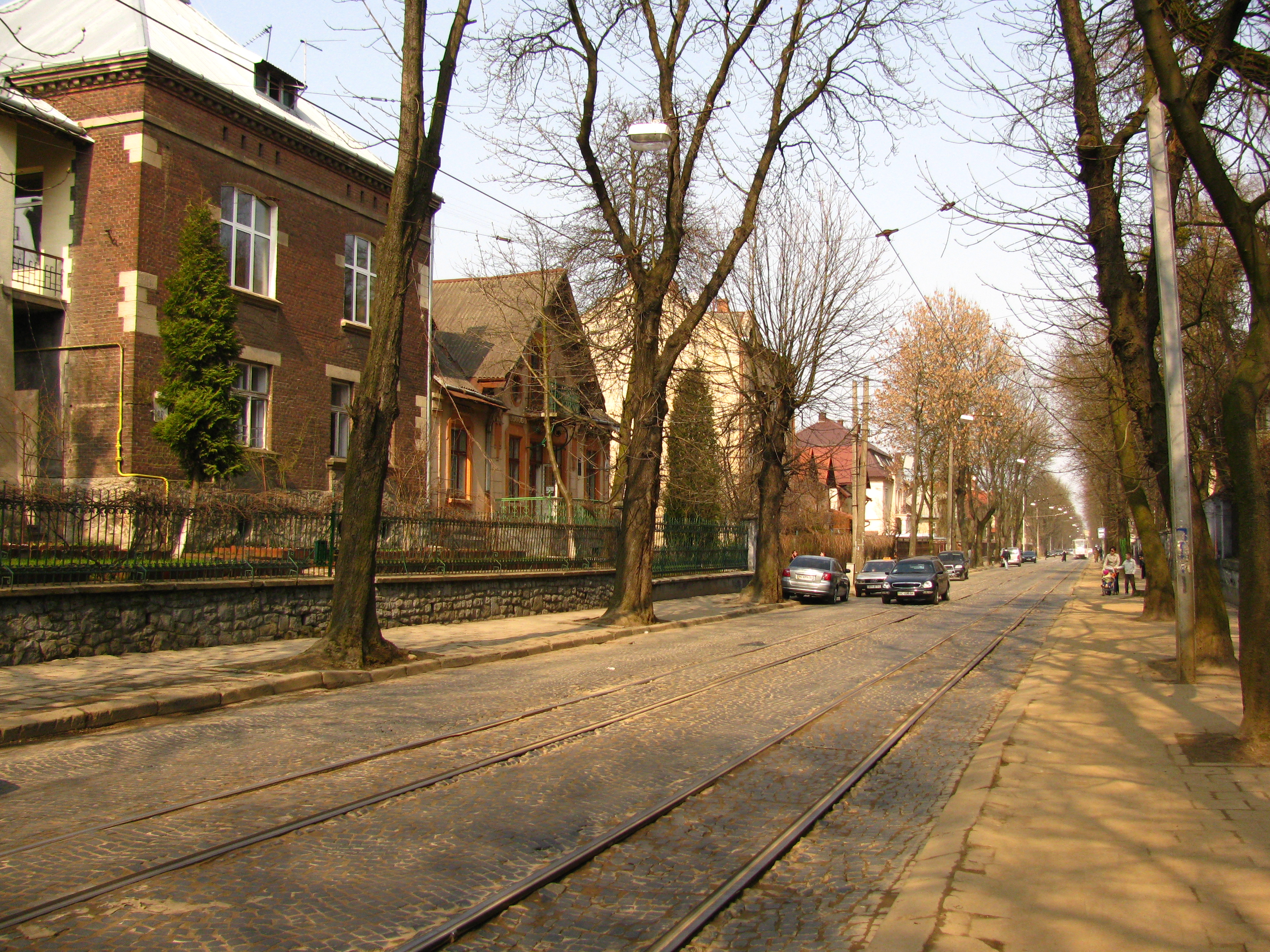 На Байках 1.jpg: Львів. Вулиця Коновальця